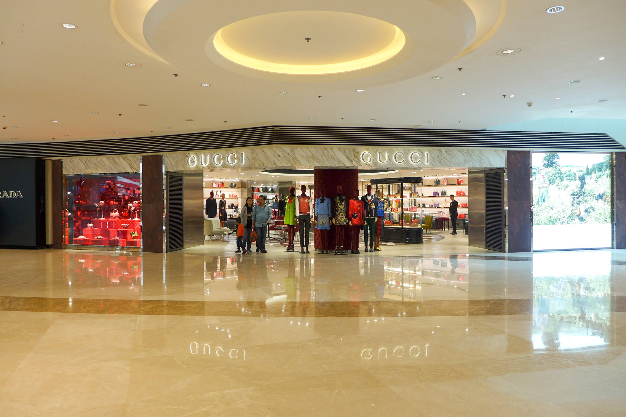 Gucci in Elements